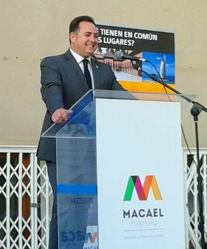 Discurso del Alcalde, Raúl Martínez, durante la Inauguracion del Centro de Interpretación del Mármol